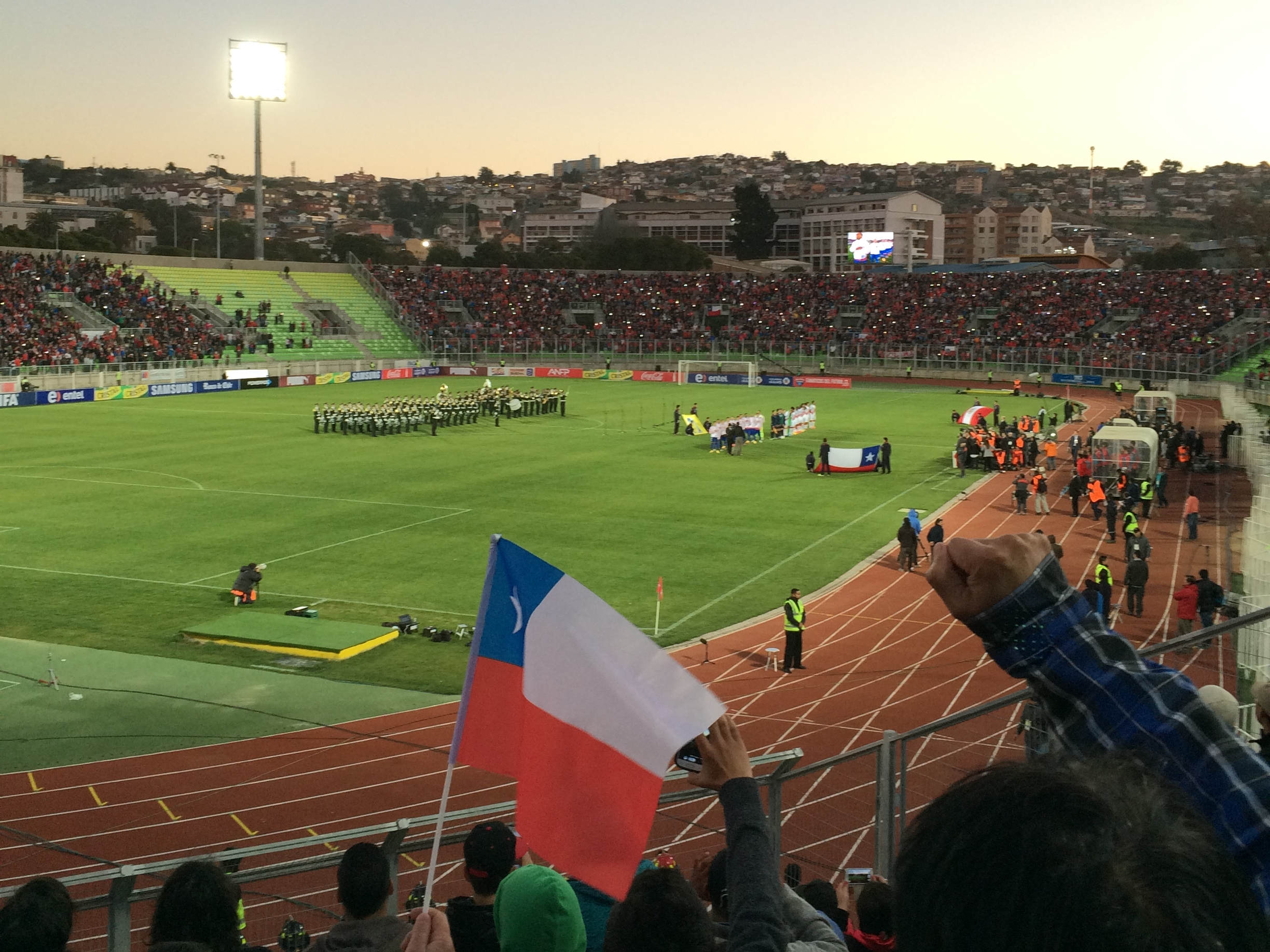 Partido Chile vs. Perú del 10 de octubre de 2014 (3-0)